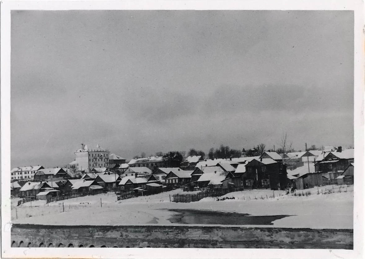 Беларуская (тарашкевіца): Менск (Miensk), Старосьцінская Слабада (Starościnskaja Słabada)